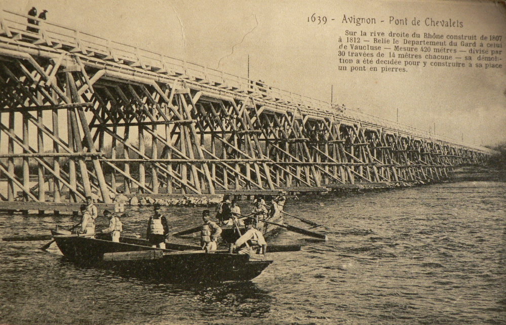 Le pont sur pilotis au dessus du Rhône reliant Avignon à Villeneuve